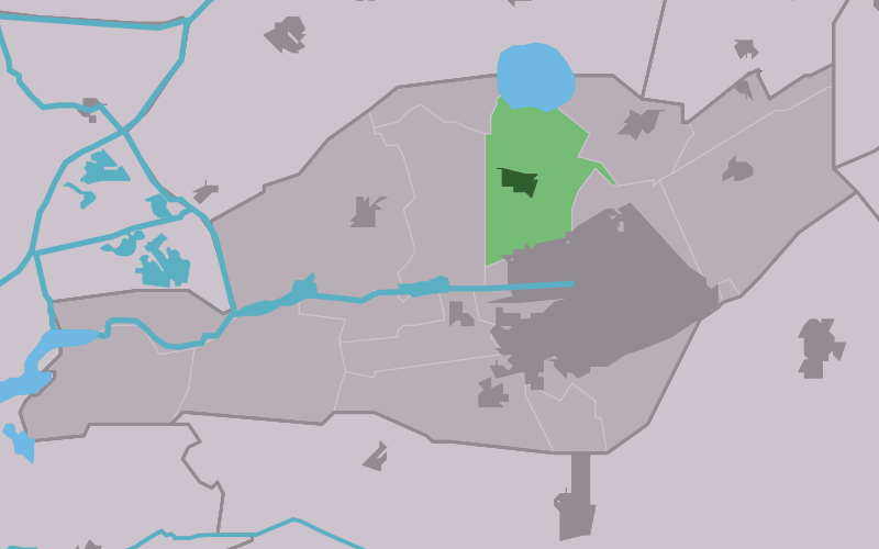 Kaartsje fan himrik fan De Pein